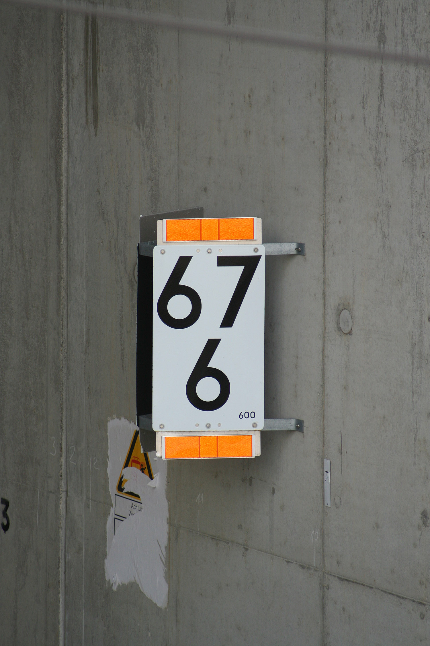 Orange-Farbige Kennzeichnung eines NBÜ-Abschnittes an einer Hektometertafel (NBS Ingolstadt - Nürnberg)